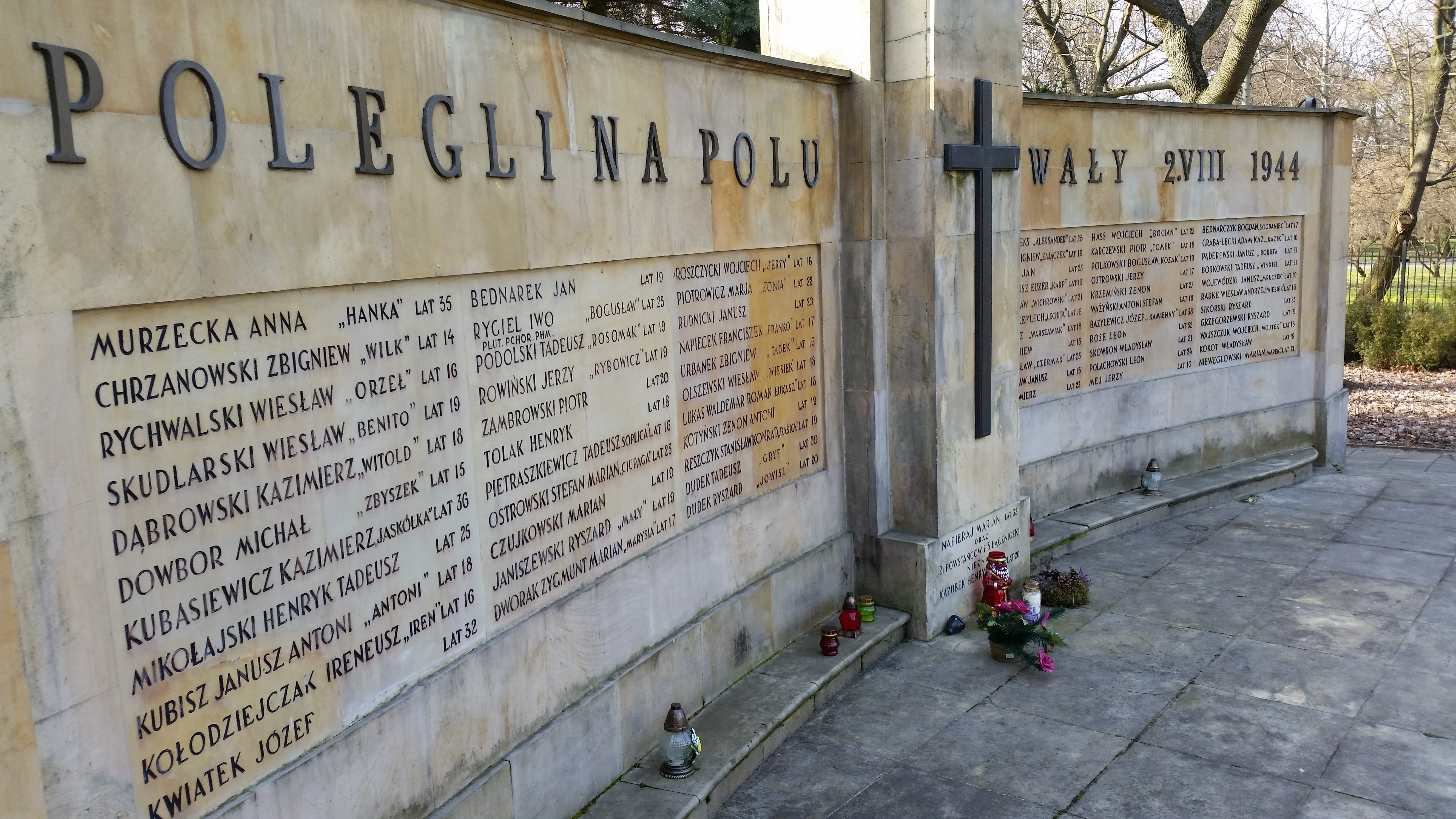 Pomnik Żołnierzy Armii Krajowej z IV Oddziału Ochota, walczących w Powstaniu Warszawskim, poległych 2 sierpnia 1944